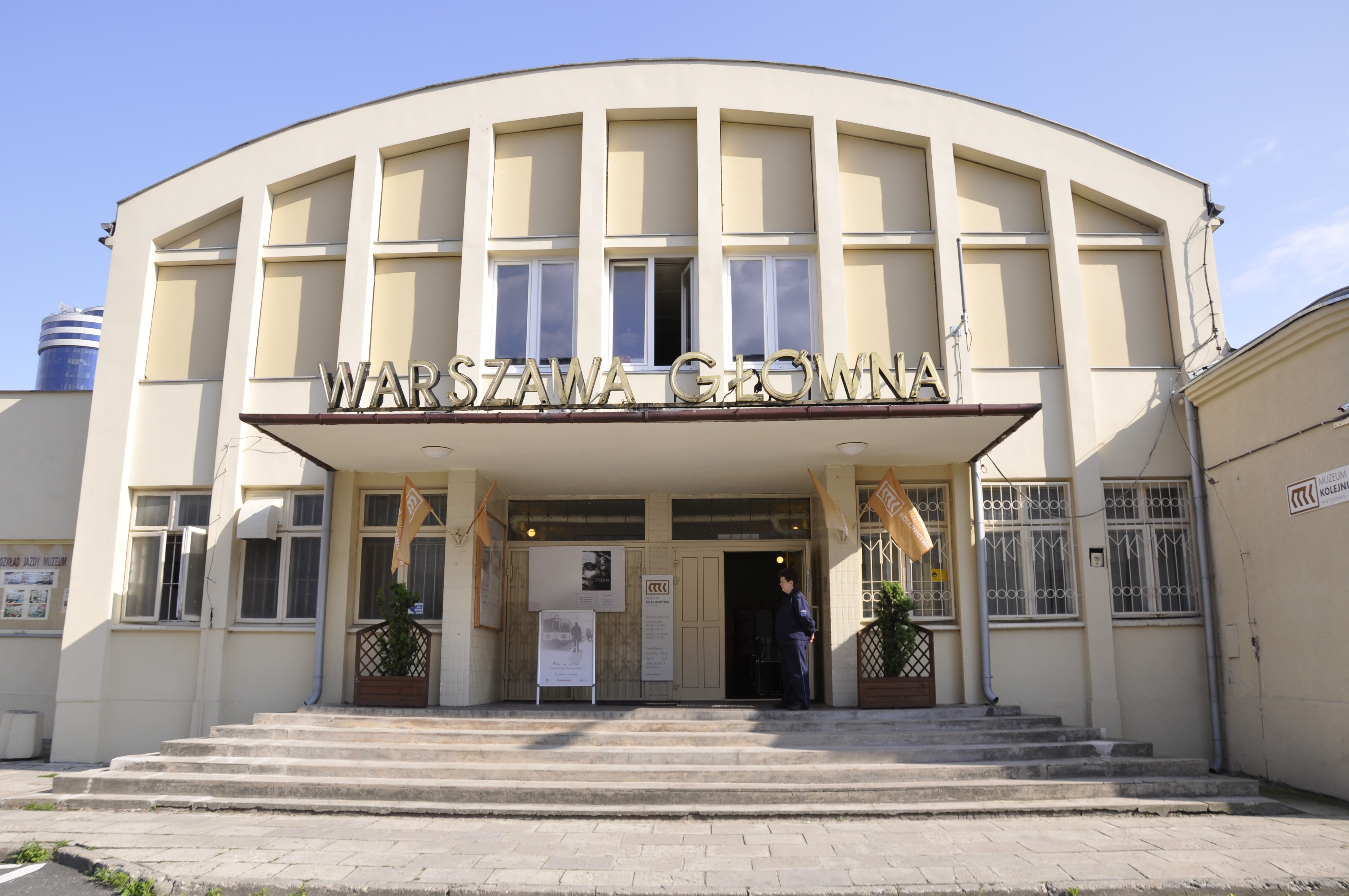 Eisenbahnmuseum Warschau, Bahnhof Warschau Glowna